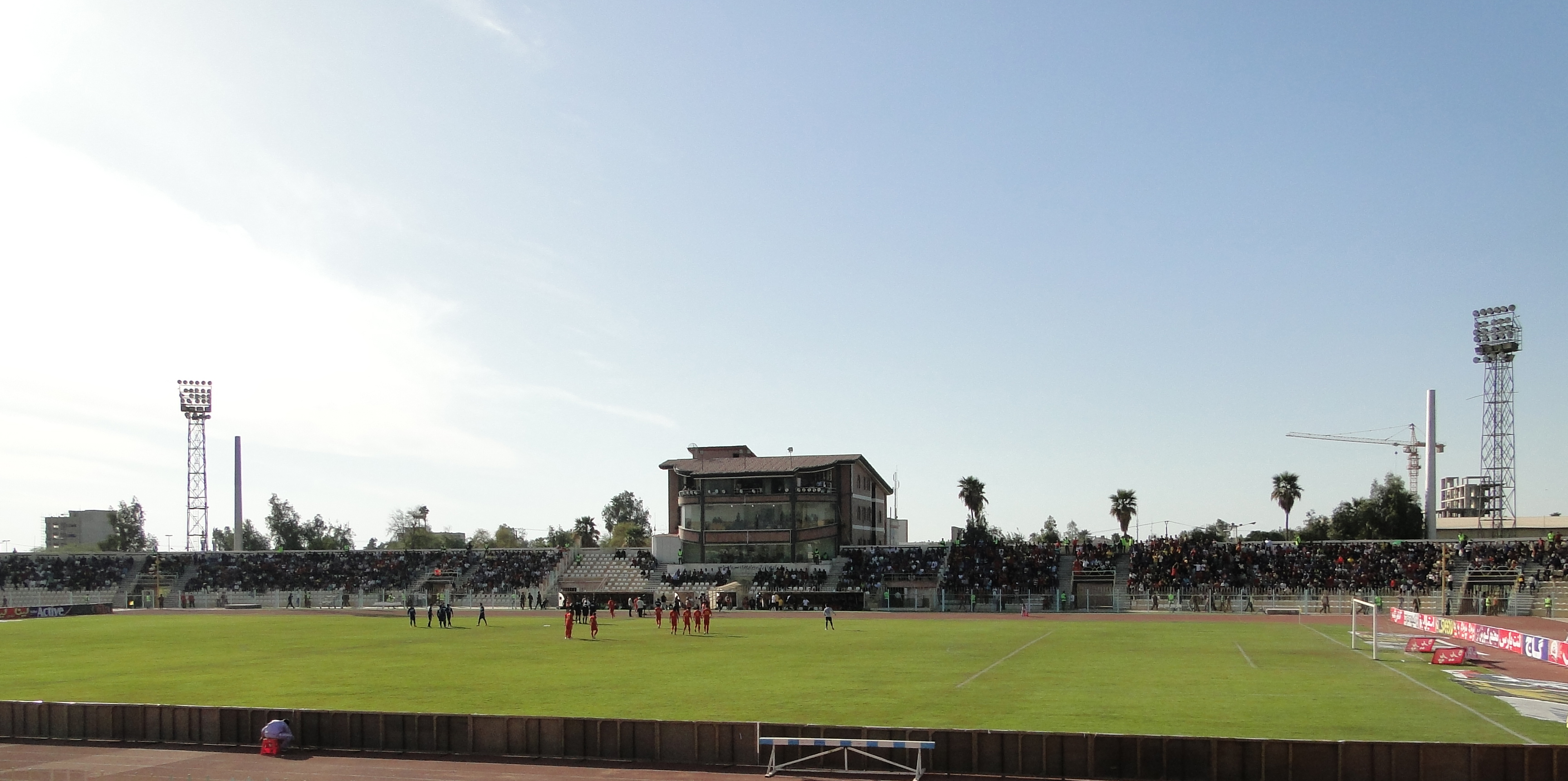 ورزشگاه تختی اهواز